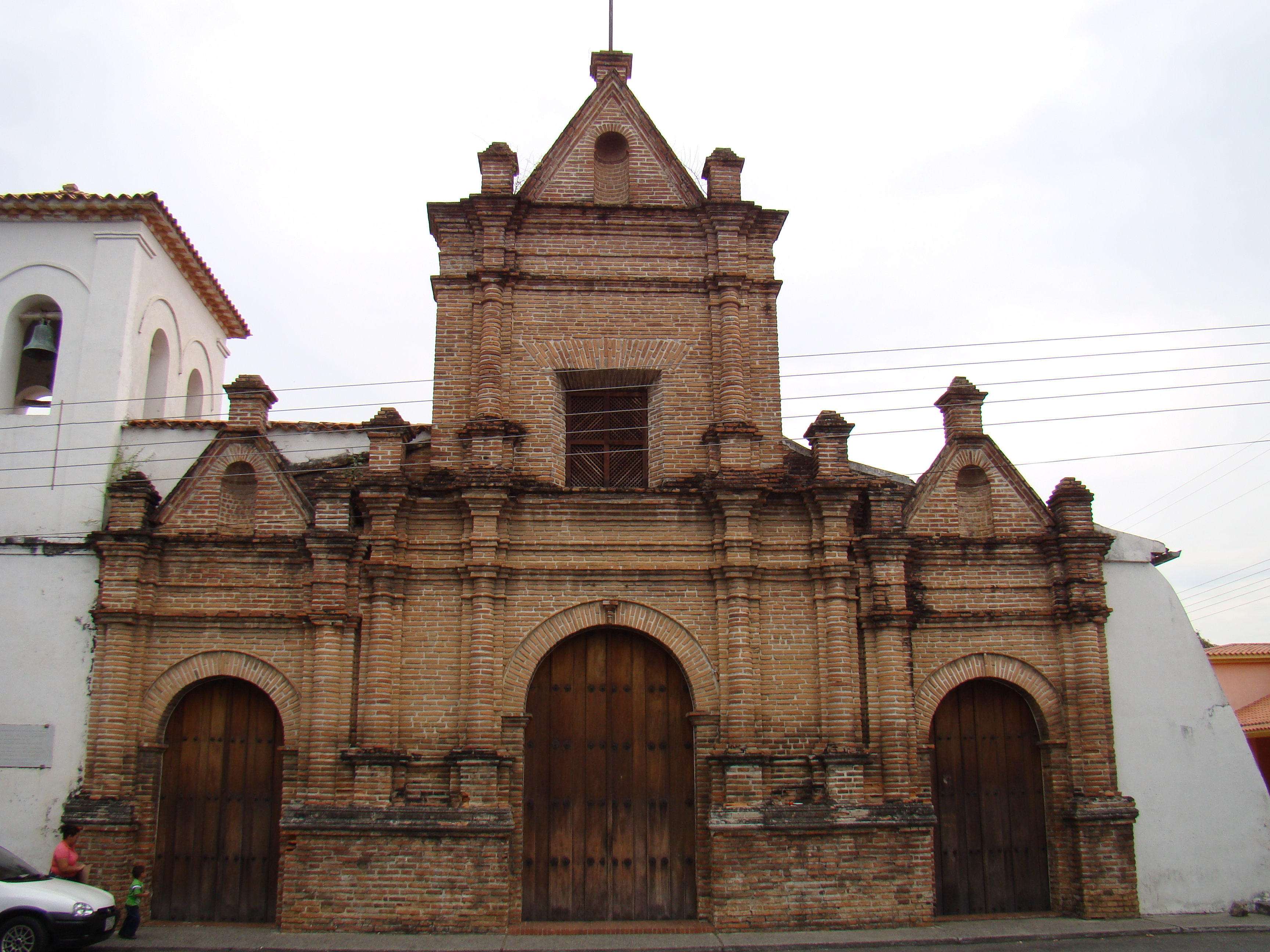 Es una obra iniciada en 1700 y en 1955 declarada Monumento Nacional. Portuguesa.